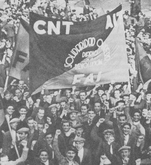 In a mass demonstration in Barcelona, workers hold a banner reading, "Solidaridad Obrera", the daily newspaper of the Spanish Revolution.